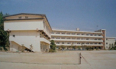 布佐中学校校庭奥から校舎全景を撮影